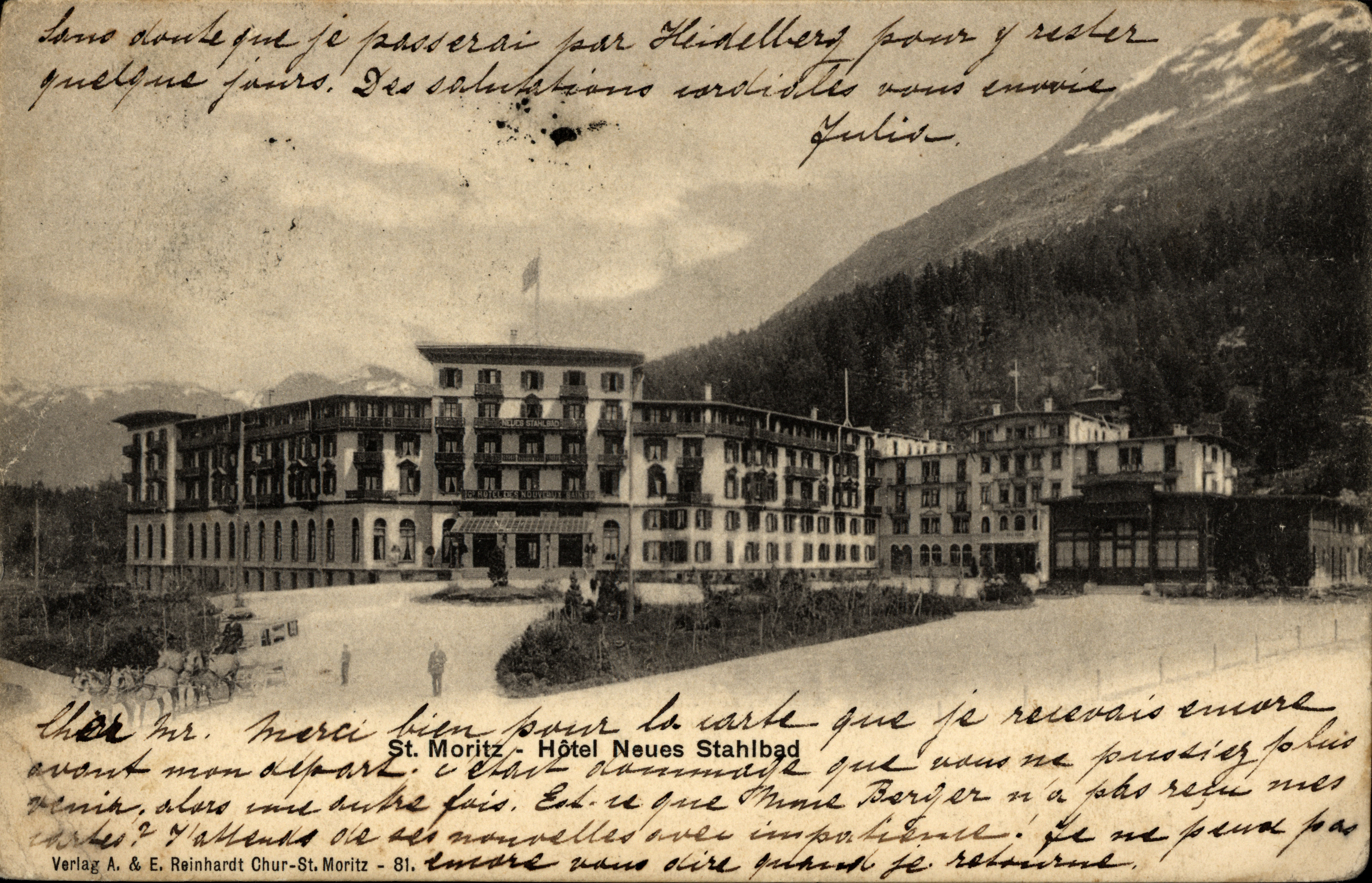 Template:Ansichtskarte Hotel Stahlbad in St. Moritz Bad, um 1900